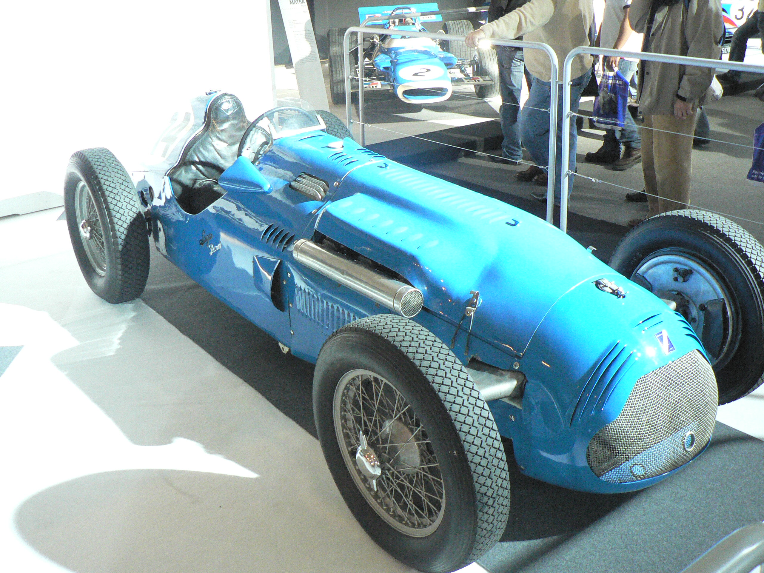 Mondial de l automobile de Paris (October 2006)